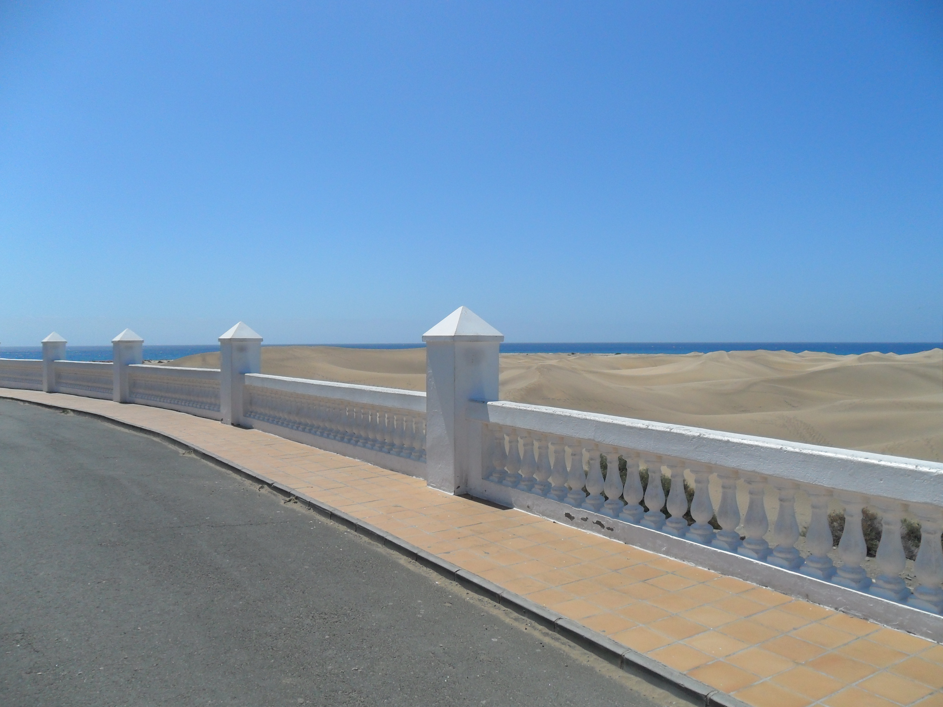 Dune di maspalomas